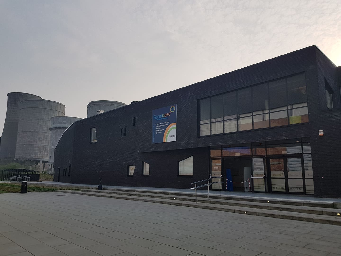 De Sportoase is een zwembad in Beringen.